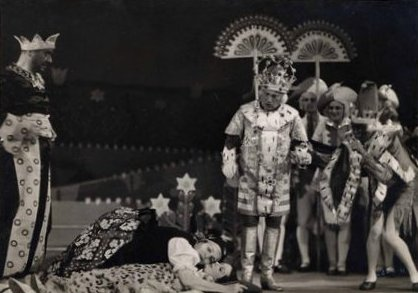 Babay József: Csodatükör. Nemzeti Színház. Bemutató: 1937/06/04. Rendező: Németh Antal. Szereplők: Fekete Király: Rajnai Gábor, Mikan néni: Berky Lili, Katalin: Somogyi Erzsi, Fehér király: Gózon Gyula, Fehér Bolond: Makláry Zoltán